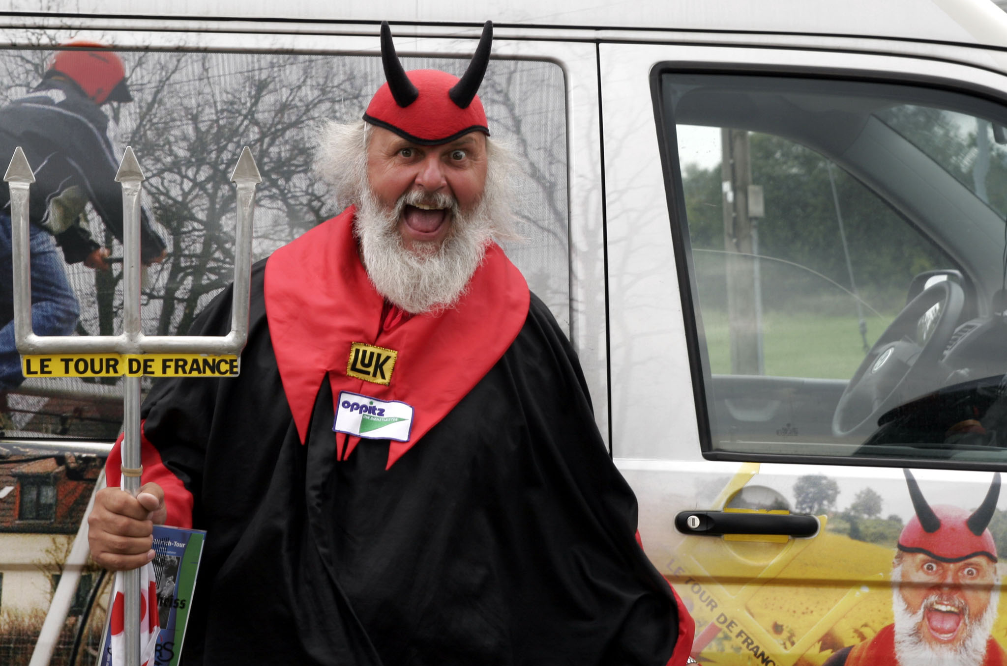 Didi Senft, legendärer Fan des Radsports, am 2. August 2007 in Lorsch beim Entega Grand Prix 2007